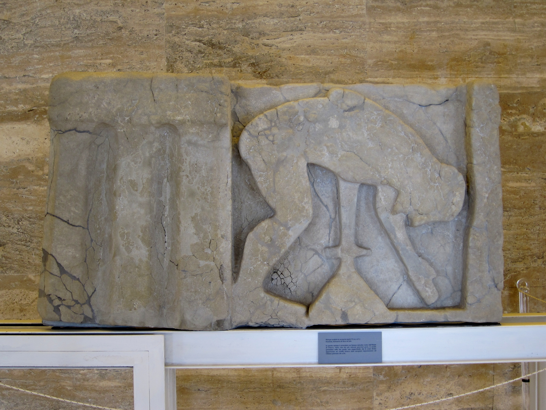 Métope du thesauros représentant le suicide d'Ajax au Museo archeologico nazionale de Paestum (Italie).